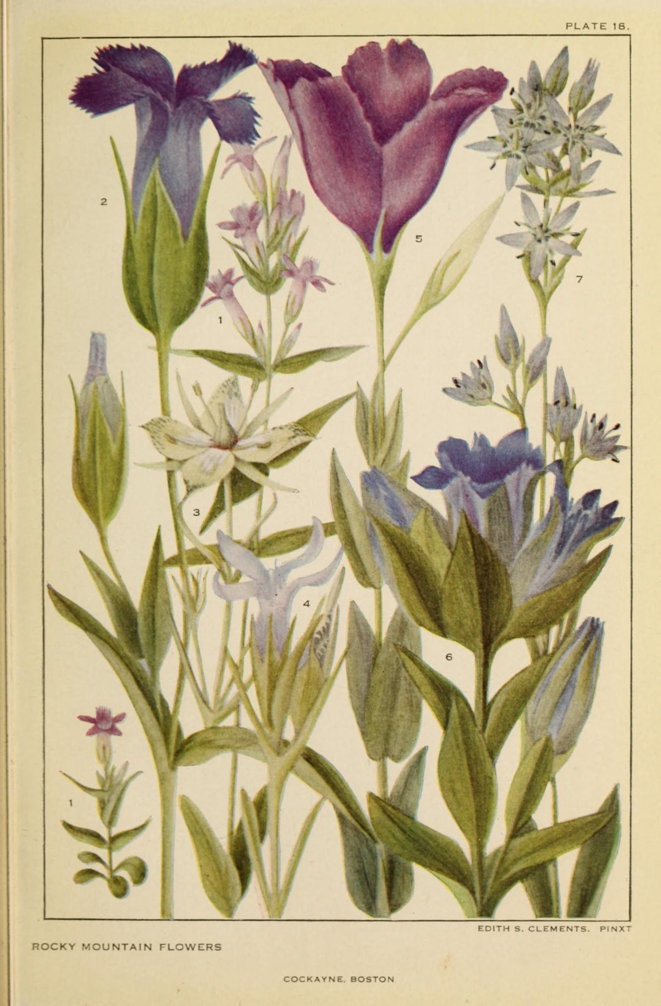 PLATE 18. EDITH S. CLEMENTS. PINX" ROCKY MOUNTAIN FLOWERS COCKAYNE. BOSTON